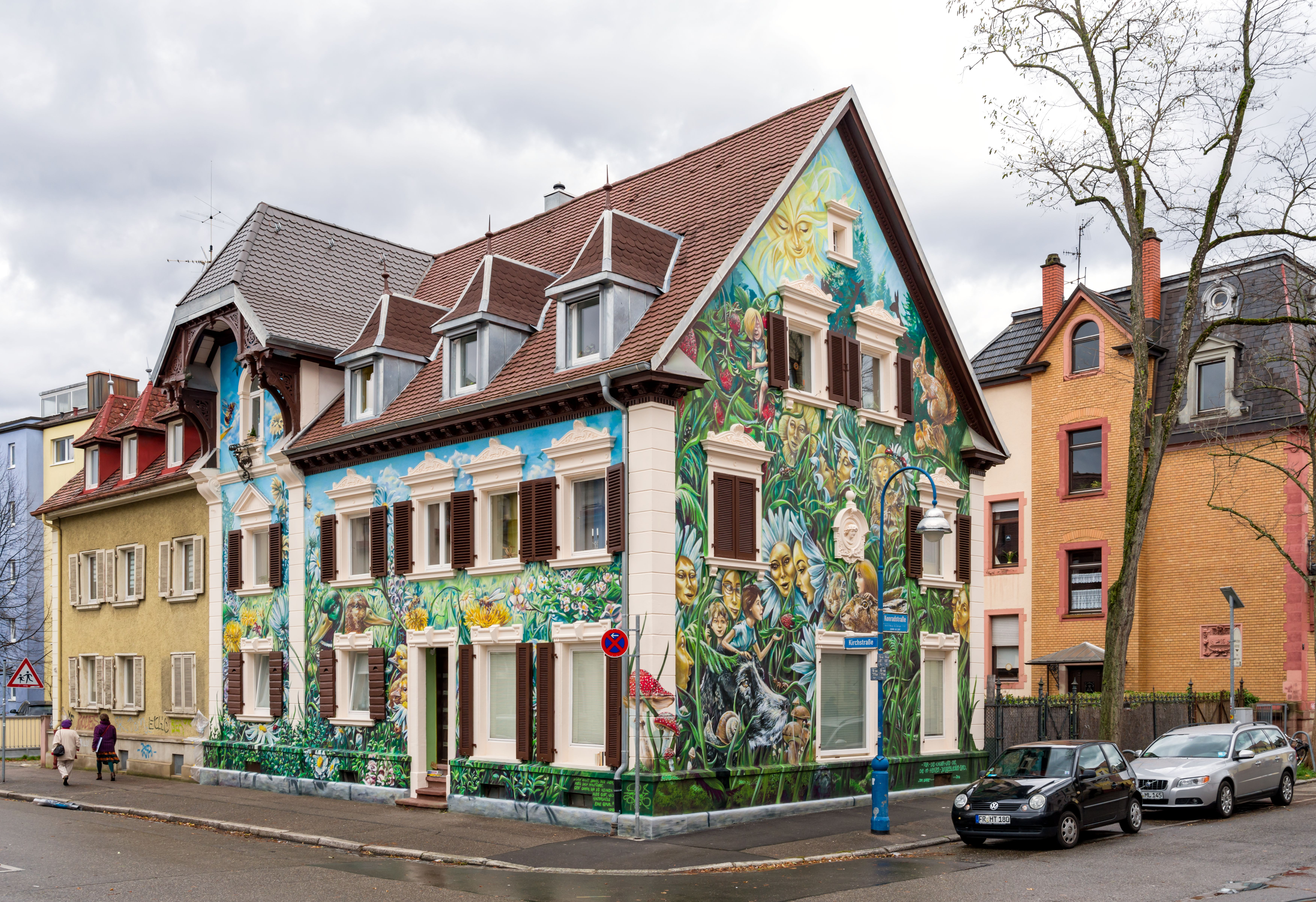 Bilder aus Freiburg im Breisgau Das Graffito in der Kirchstraße 17 in Freiburg im Breisgau. Zwei Seiten des Hauses sind fertig. Die dritte Seite folgt im Frühjahr 2017 Der Künstler ist Tom Brane